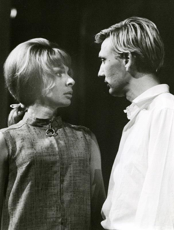 Ulla Edin och Sven Timner i S.O.S eller Sanningen om säkerhet på Helsingborgs stadsteater.